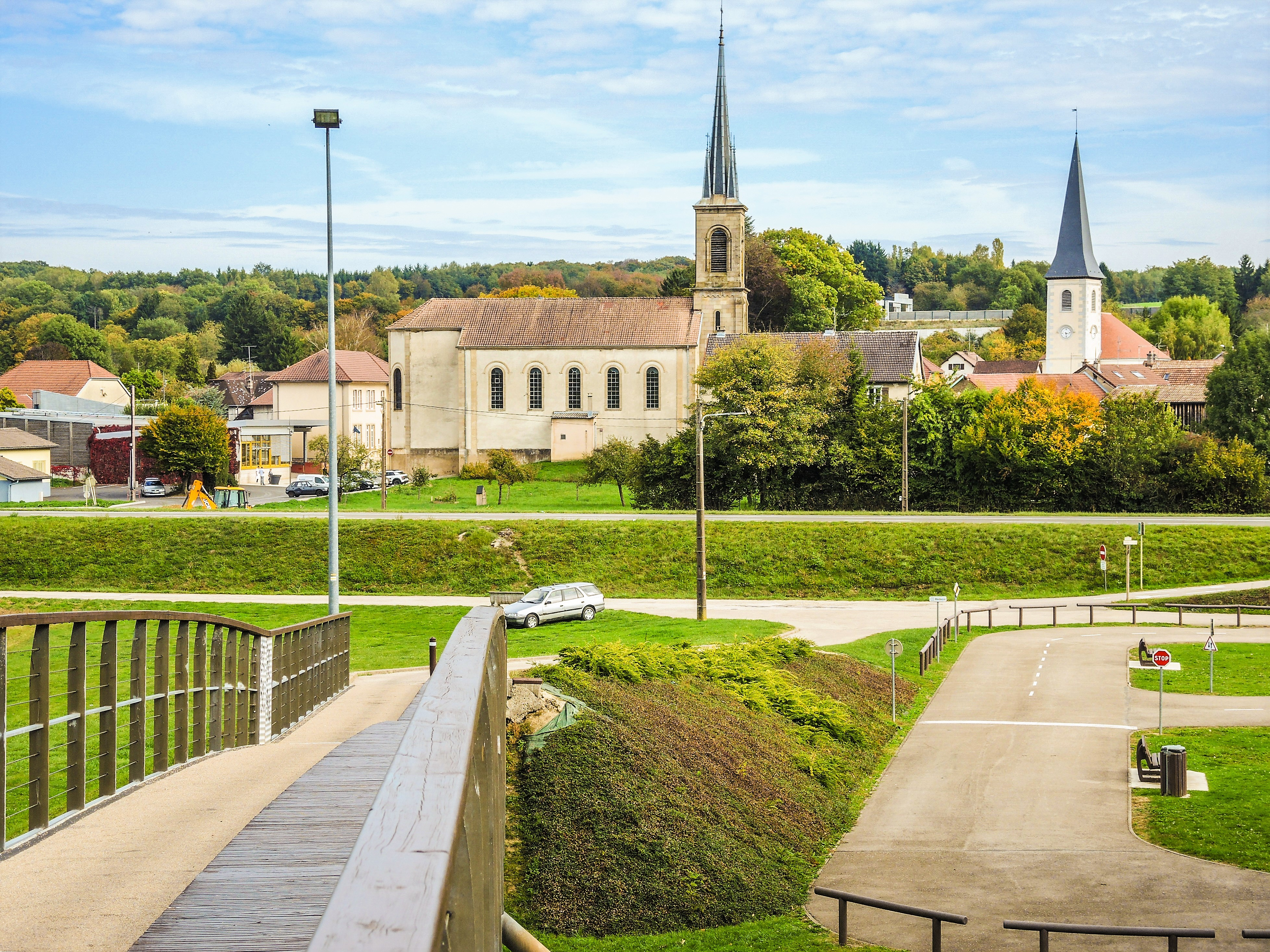 Eglise saint Michel et temple de Voujeaucourt, vus de la passerelle en dos d'âne sur le Doubs. Doubs